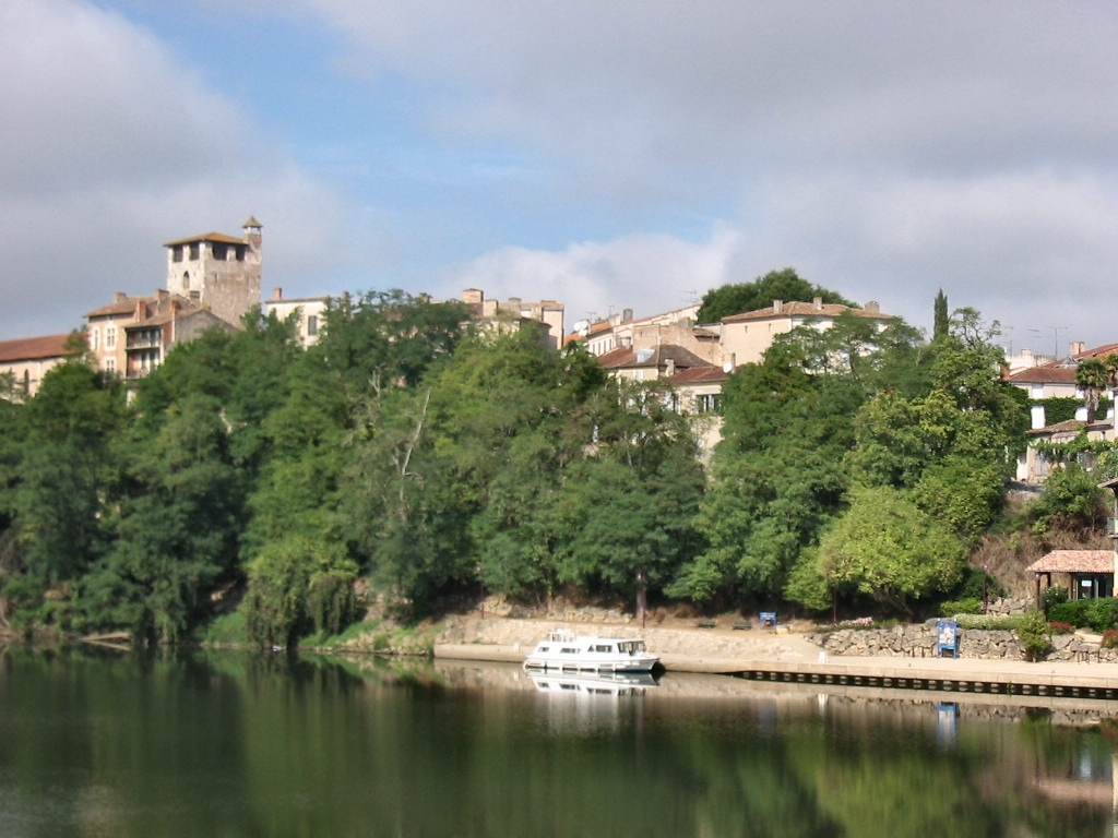 Clairac, Ansicht von der Brücke über den Lot